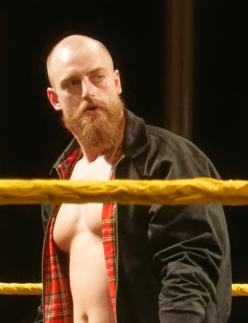 WWE Live 2018 - Antwerpen (NxT) - Adam Cole Vs Zack GibsonAdam Cole (c) def. (Pin) Zack GibsonFor : NXT North American Championship (No Title Change)( Bonne nouvelle pour les inconditionnels du catch en Belgique : le mardi 12 juin 2018, les superstars de NXT donneront le meilleur d'eux-memes au Stadsschouwburg Antwerpen, lors d'un show exclusif au Benelux.WWE NXT est une emission televisee creee en 2010, durant laquelle de jeunes catcheurs sont formes par des veterans comme Chris Jericho et C.M. Punk. Tous partagent le meme reve : devenir la nouvelle star du catch. Le programme WWE NXT a tres vite rencontre un enorme succes. Aujourd'hui, WWE NXT est connu comme une veritable machine a talents. Pensez par exemple a Seth Rollins, qui etait encore chez nous pas plus tard que l'annee derniere pour WWE Live.Cette annee encore, vous aurez la chance de voir a l'oeuvre de nombreux nouveaux talents du catch ! A l'affiche, on trouve notamment Aleister Black, Adam Cole, Undisputed Era, Velveteen Dream, Ricochet, Nikki Cross, Shayna Baszler et Kairi Sane. Le line-up reste sujet a des changements de derniere minute.Attendez-vous a un show sensationnel et plein de tension ! )